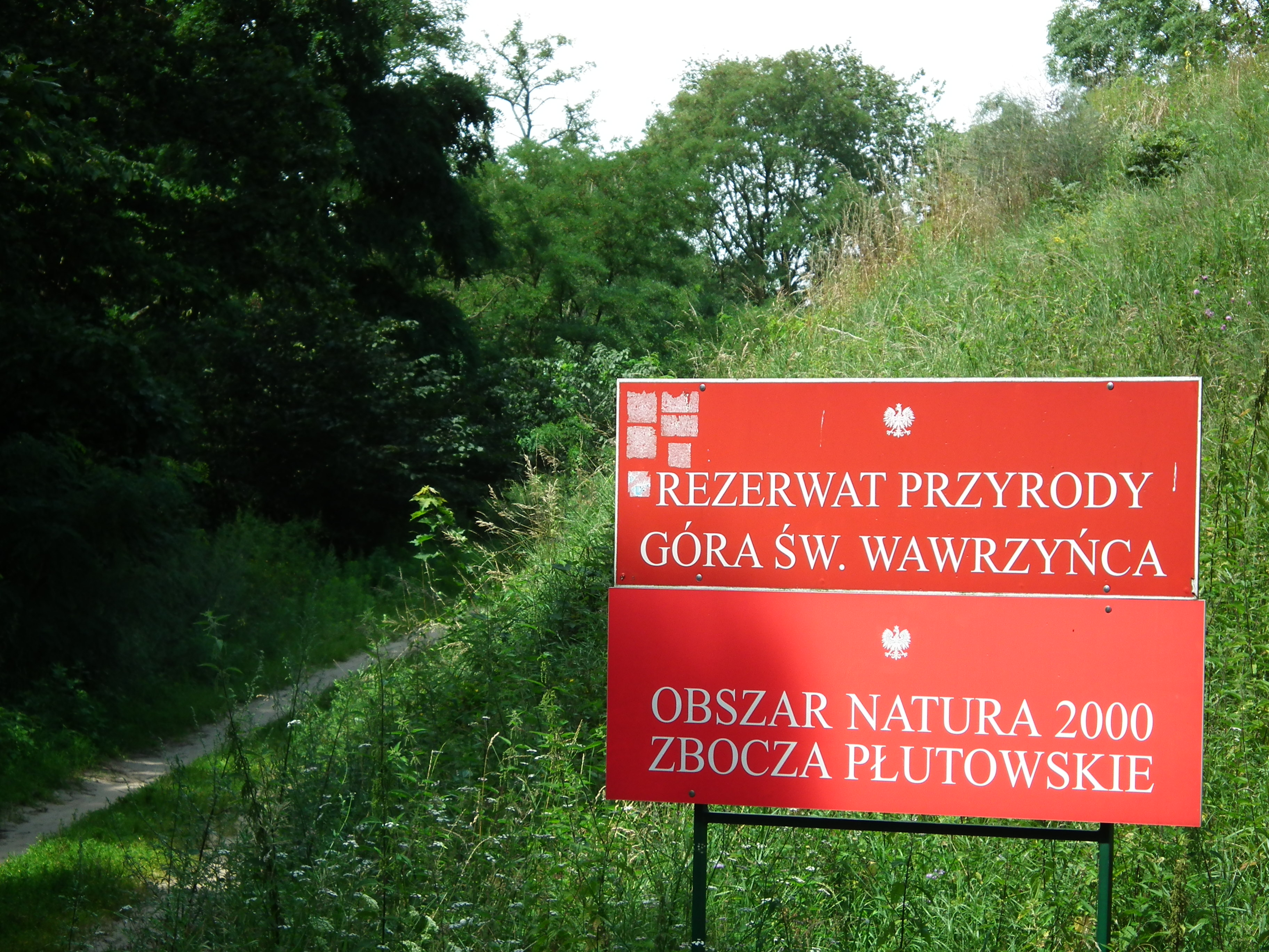 Góra Św. Wawrzyńca pod Chełmnem (grodzisko).